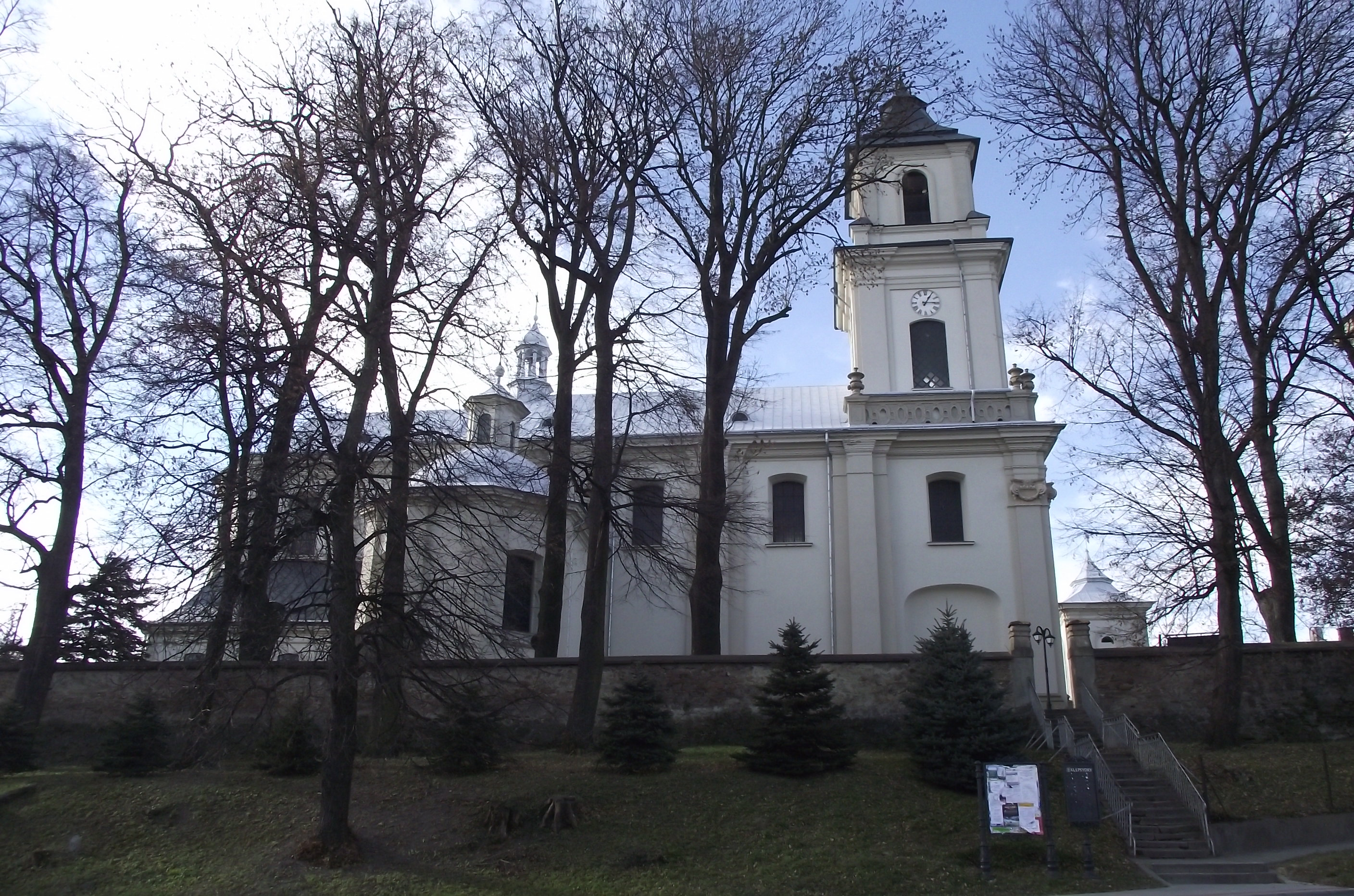 Kościół parafialny p.w. św. Wawrzyńca w Rymanowie